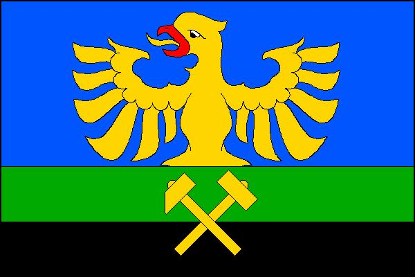 Vlajka města Petřvald (okres Karviná)